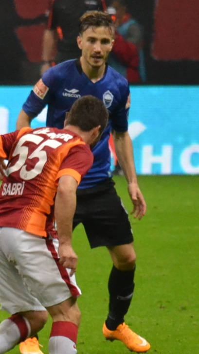 Anıl Karaer